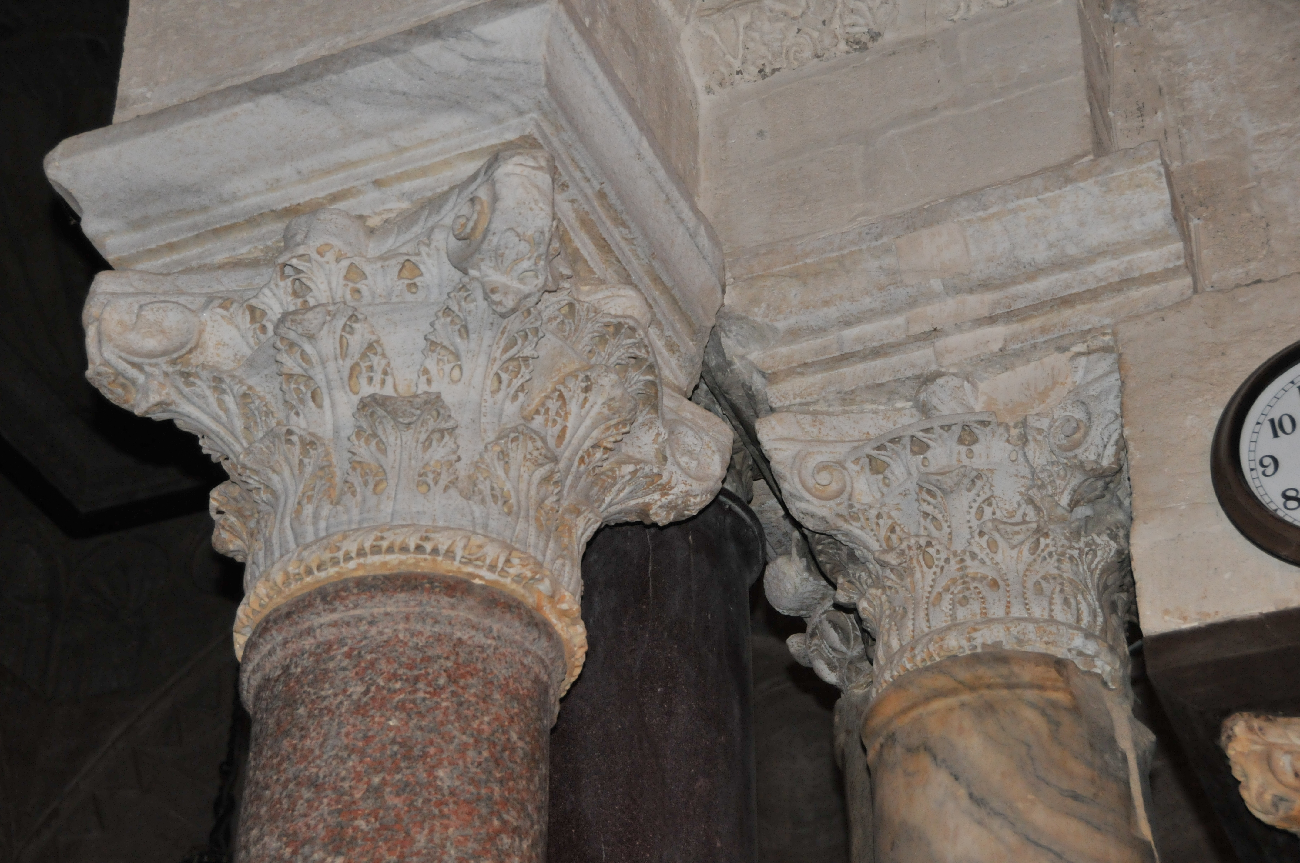 Vue de deux chapiteaux d'origine antique dans la salle de prière de la Grande Mosquée de Kairouan, en Tunisie.